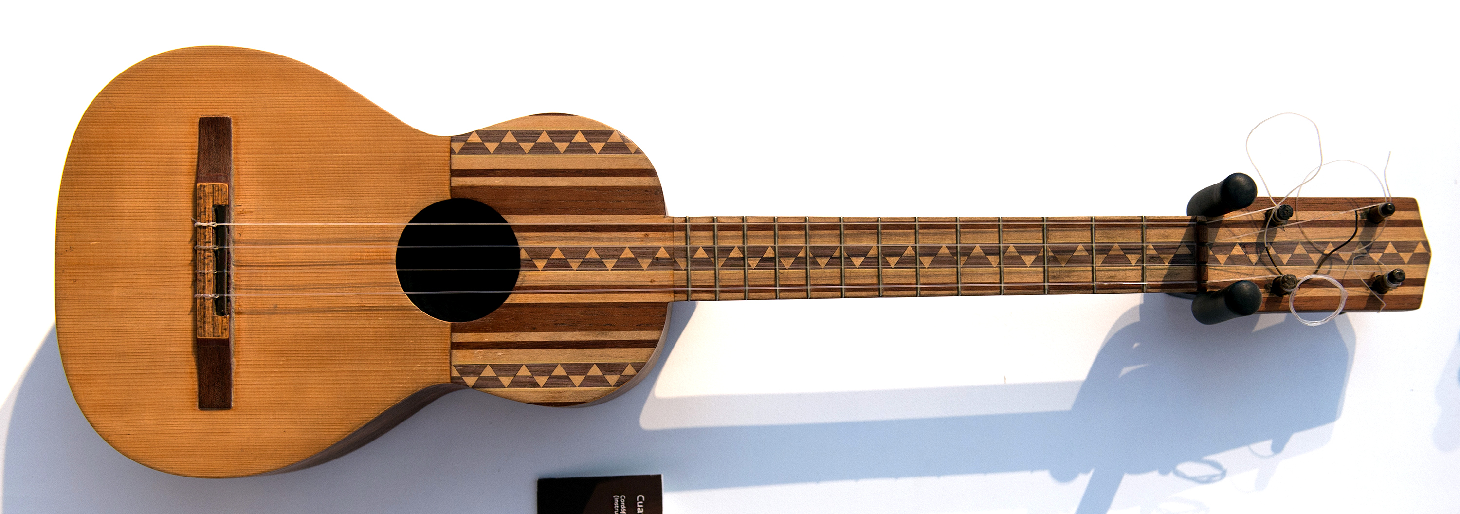 Cuatro Venezolano Cordófono (Instrumento de cuerda) Museo de Arte Precolombino e Indígena 25 de Mayo 279 Montevideo, Uruguay